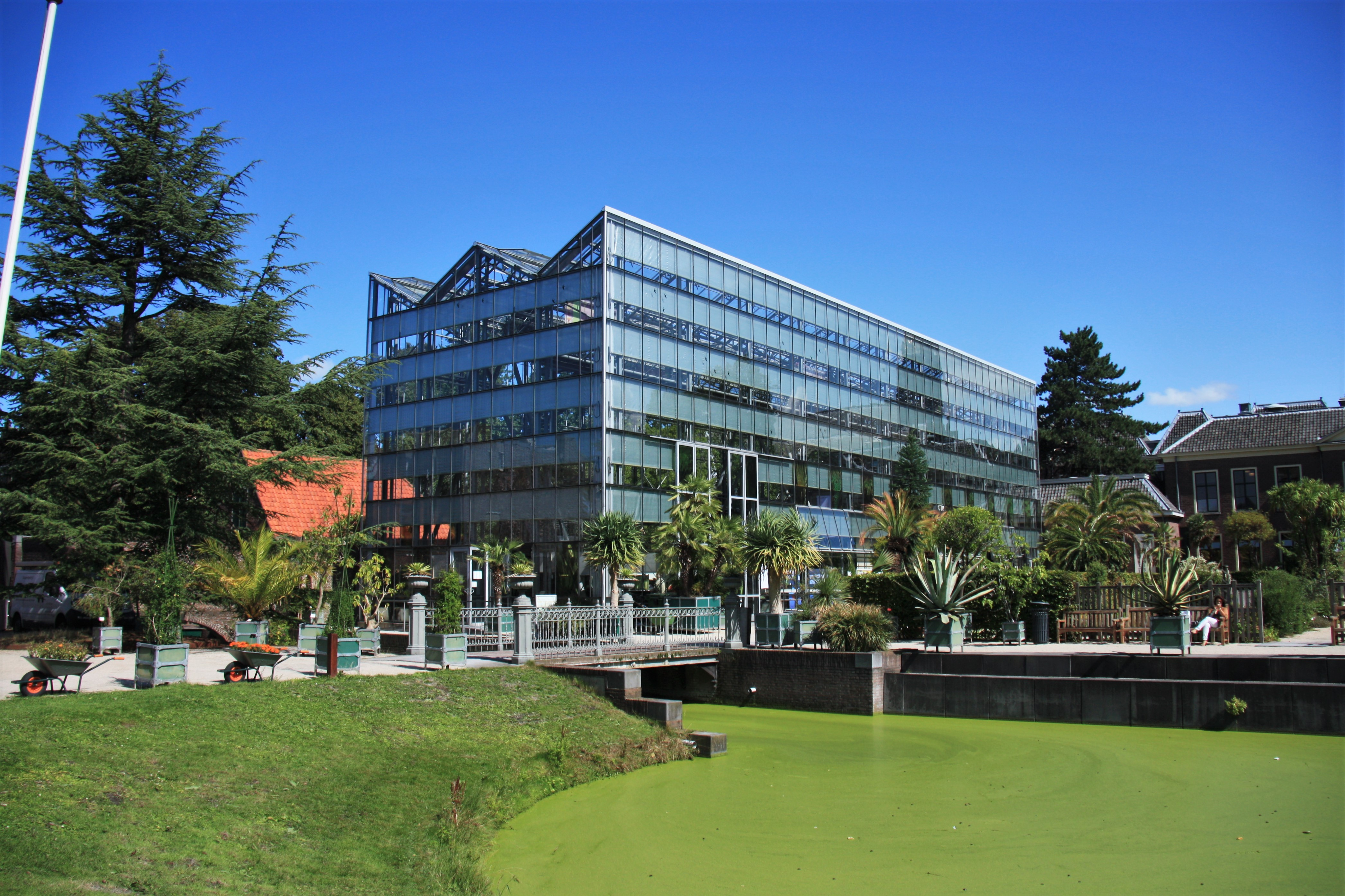 Будівля Зимового саду у Лейденському ботанічному саду